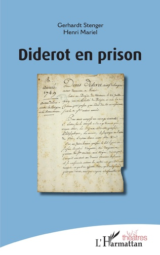 En 1749, suite à la publication de plusieurs ouvrages jugés subversifs par le pouvoir dans la France toute catholique du XVIIIe siècle, Diderot est arrêté et emprisonné au sinistre donjon du château de Vincennes. Dans des scènes croisées et entremêlées, les auteurs nous invitent, avec un ton badin et sur un rythme léger, à réfléchir sur la liberté d'expression et la censure, la sexualité et le libertinage, la relation entre la religion et la science, l'origine du mal et la vie en société.